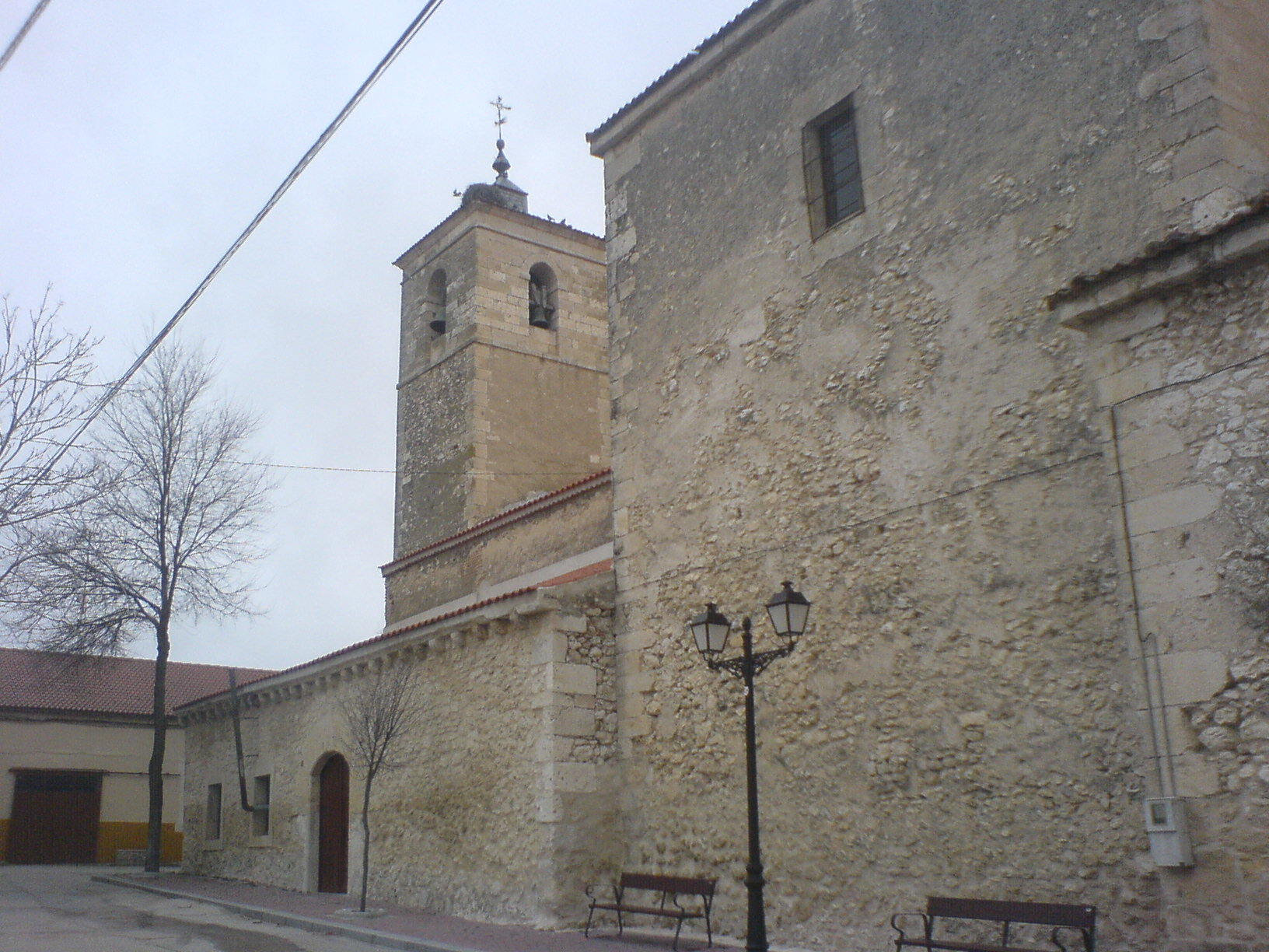 Iglesia parroquial de Lovingos, en la provincia de Segovia.